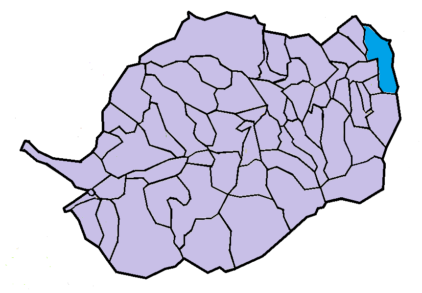 Rodès en el Conflent, a partir del mapa municipal del Conflent de lliure disposició adaptat al Nomenclàtor toponímic aprovat el 2007.